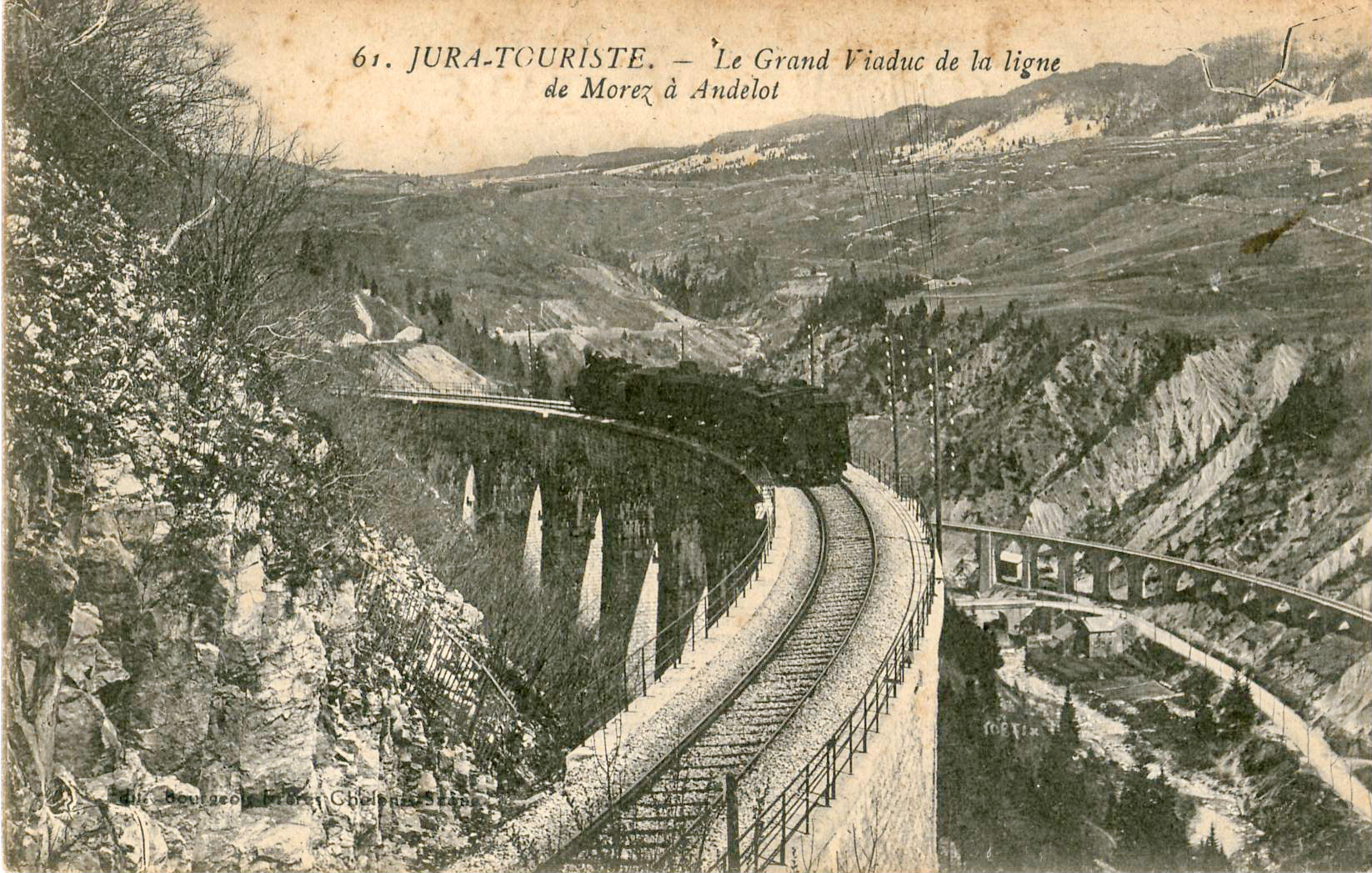 Carte postale ancienne éditée par Bourgeois Frères, collection Jura Touriste, n°61 : Le grand viaduc de la ligne de Morez à Andelot